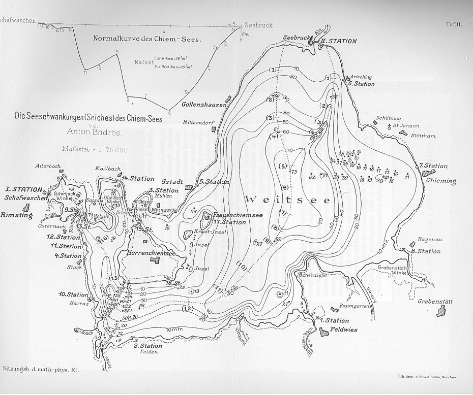 Tiefenkarte Chiemsee 1906 Anton Endrös